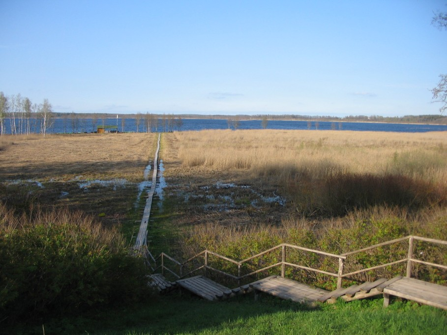 Lielauces ezers